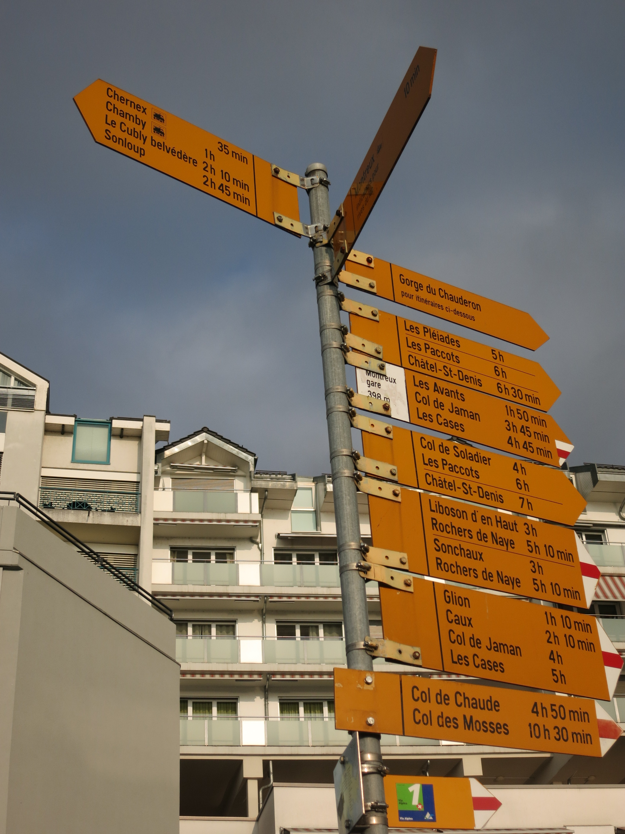 Via Alpina, Montreux VD, Schweiz